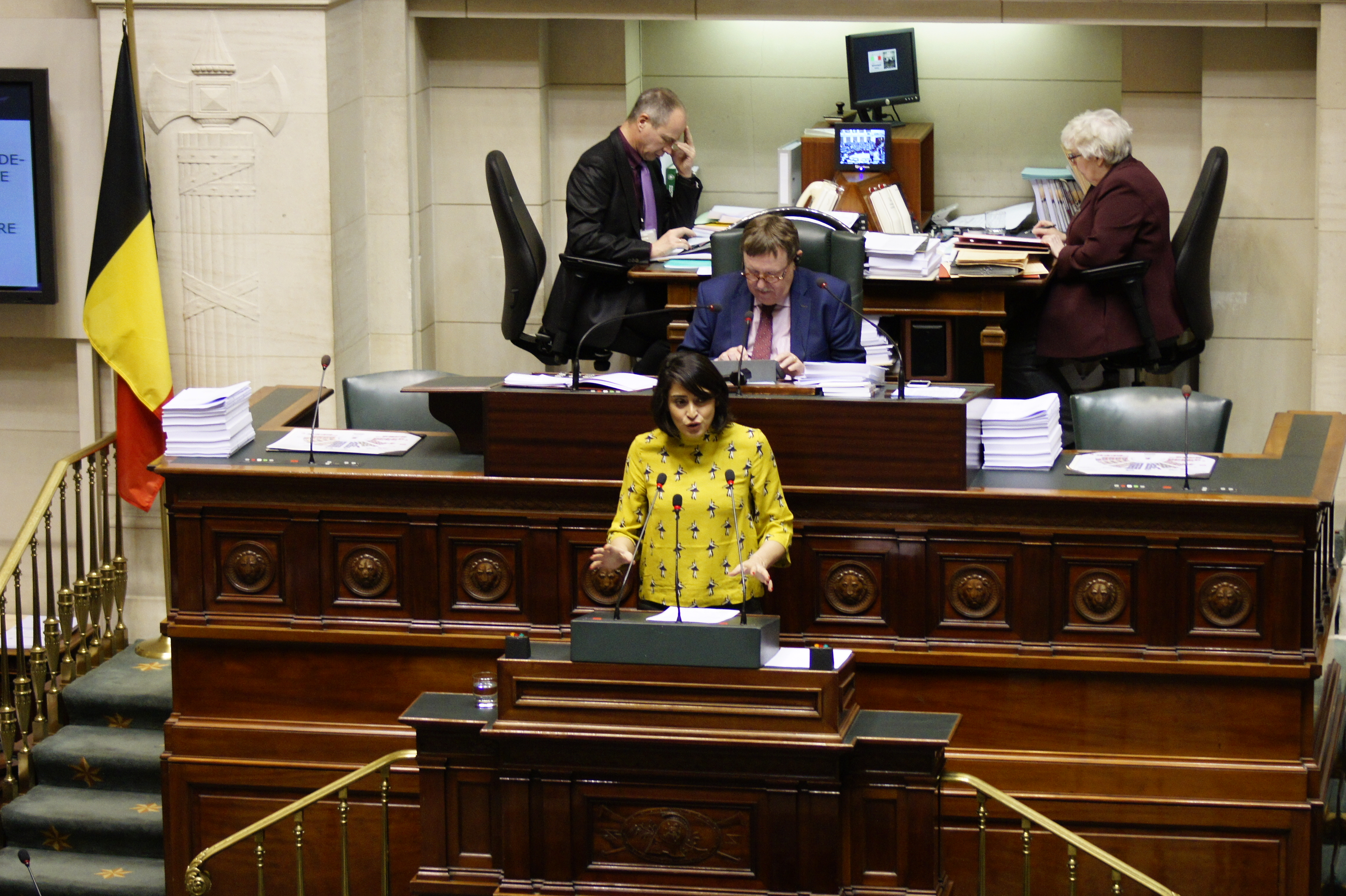 Özlem prend la parole à la Chambre dans le cadre du projet de réforme de la Justice "Pot-Pourri II"